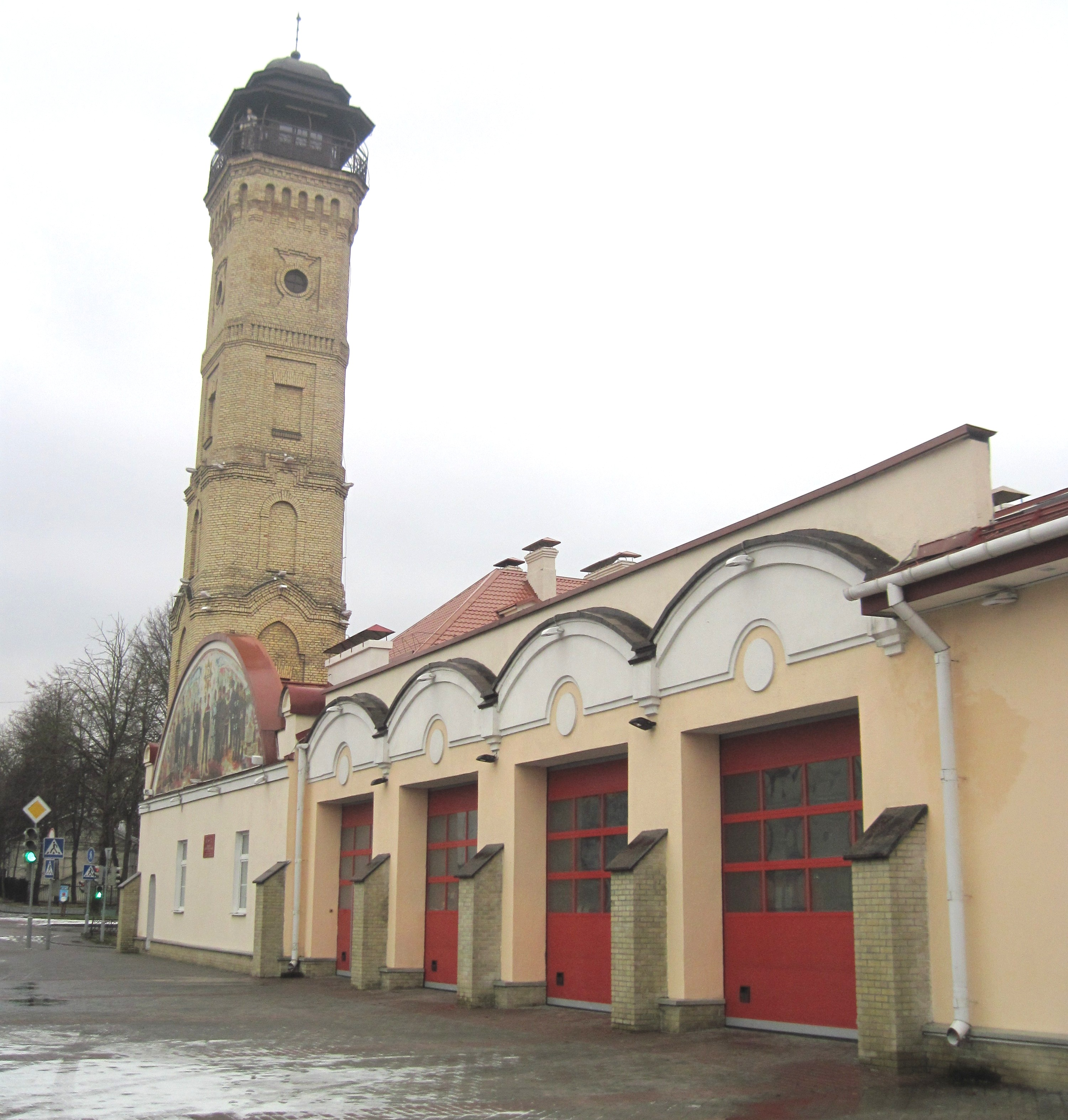 Беларуская (тарашкевіца): Пажарная каланча ў Гродне